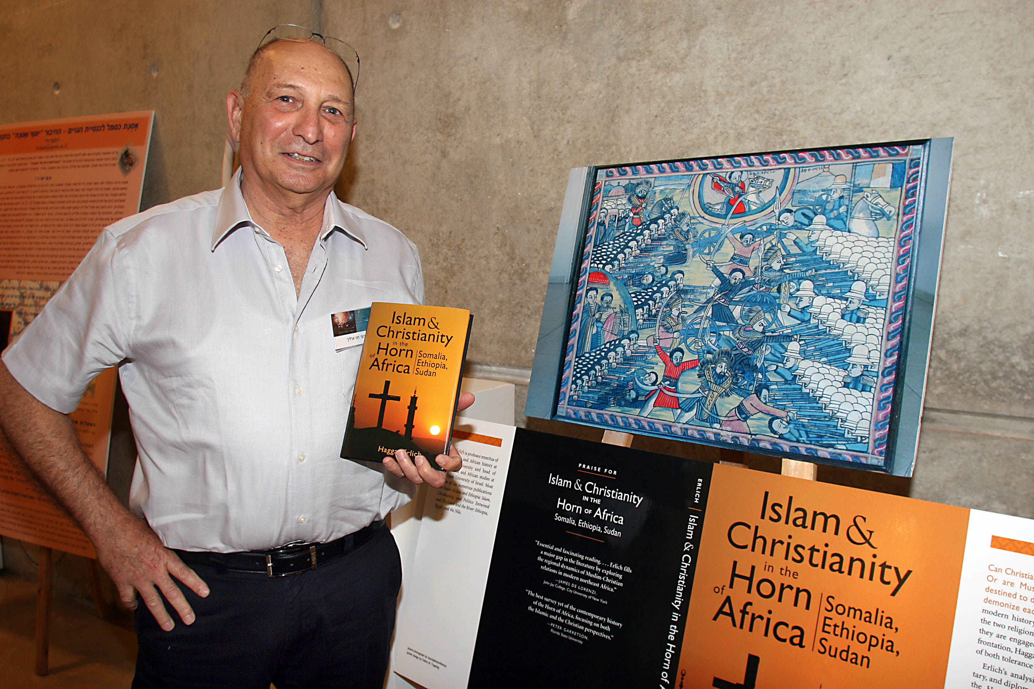 Islam and Christianity in the Horn of Africa, הספר פורסם ב – 2010.